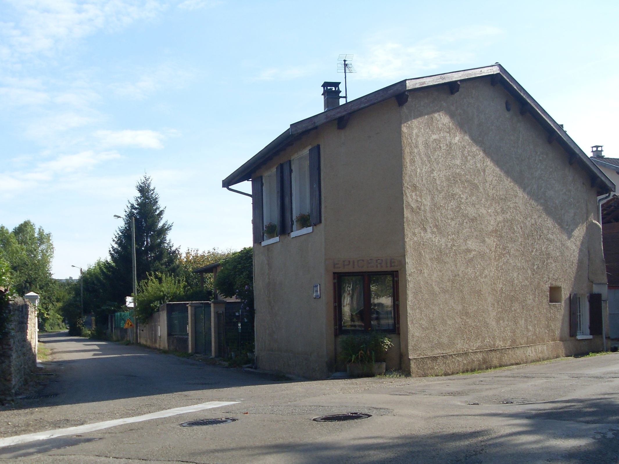 Ancienne épicerie, à Villefontaine (Isère)